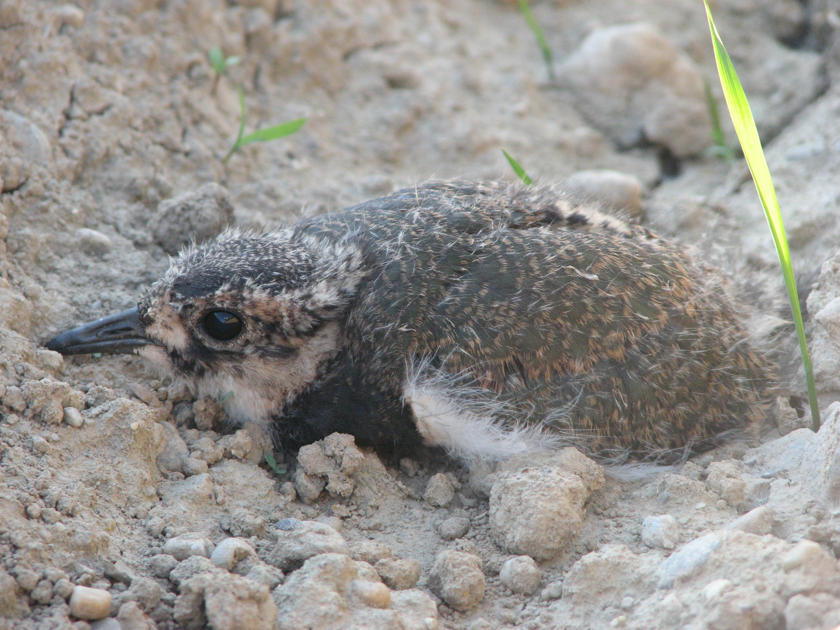 Vanellus vanellus , deutsch Kiebietz